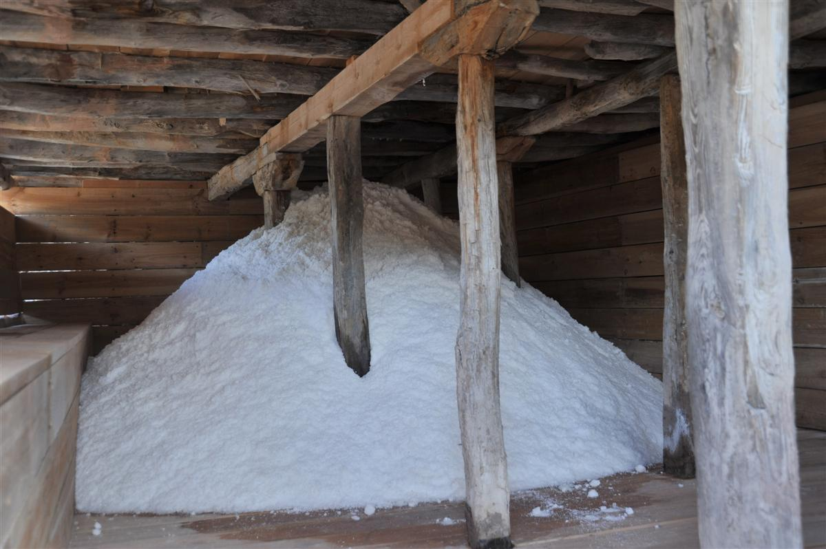 Almacén situado en el interior de la explotación salinera de Salinas de Añana, Álava, País Vasco, España